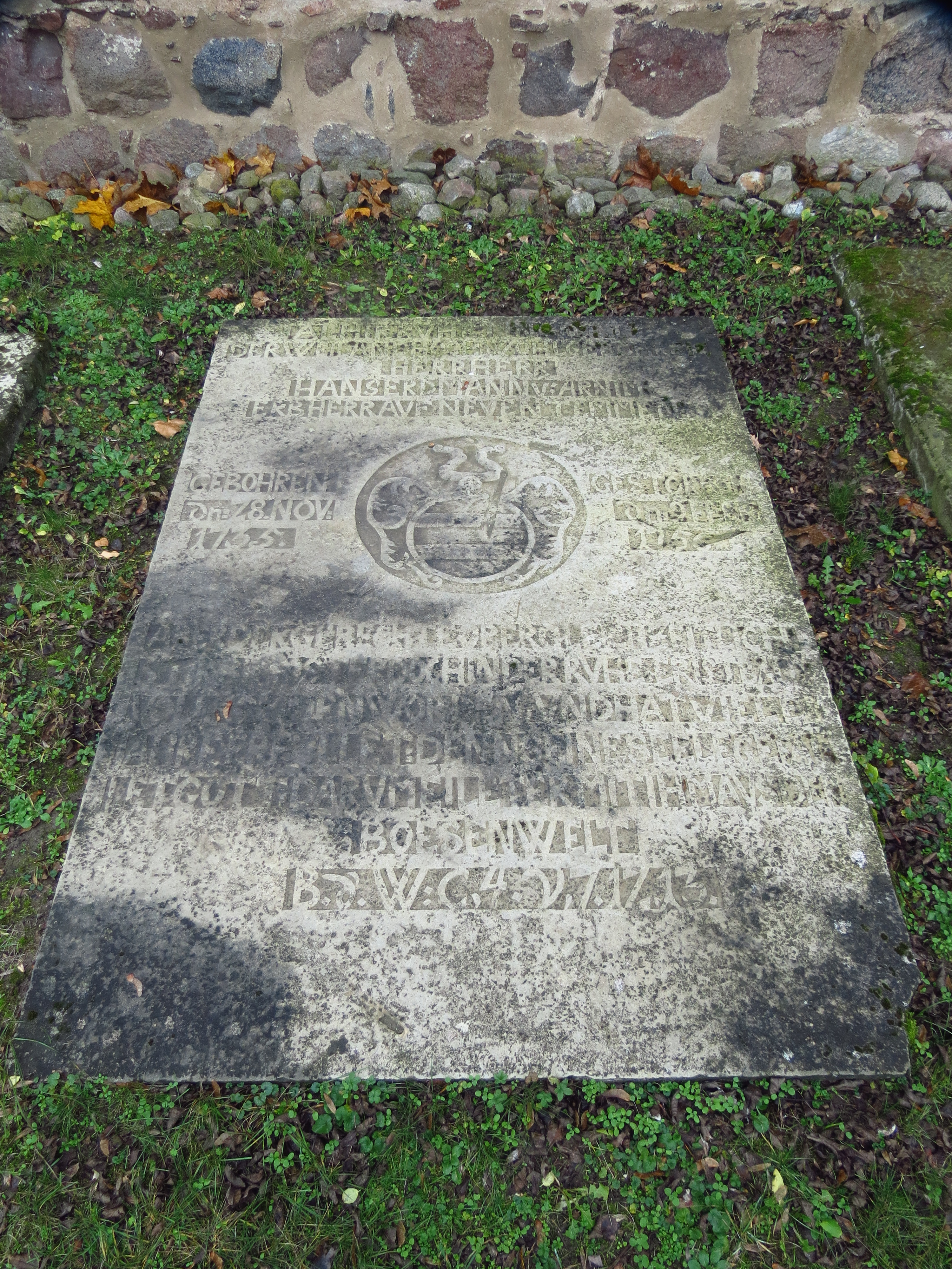 Grabplatte Hans Erdmann von Arnim (1735-1756), Ostseite der Dorfkirche Groß Fredenwalde, Gem. Gerswalde, Lkr. Uckermark, Brandenburg